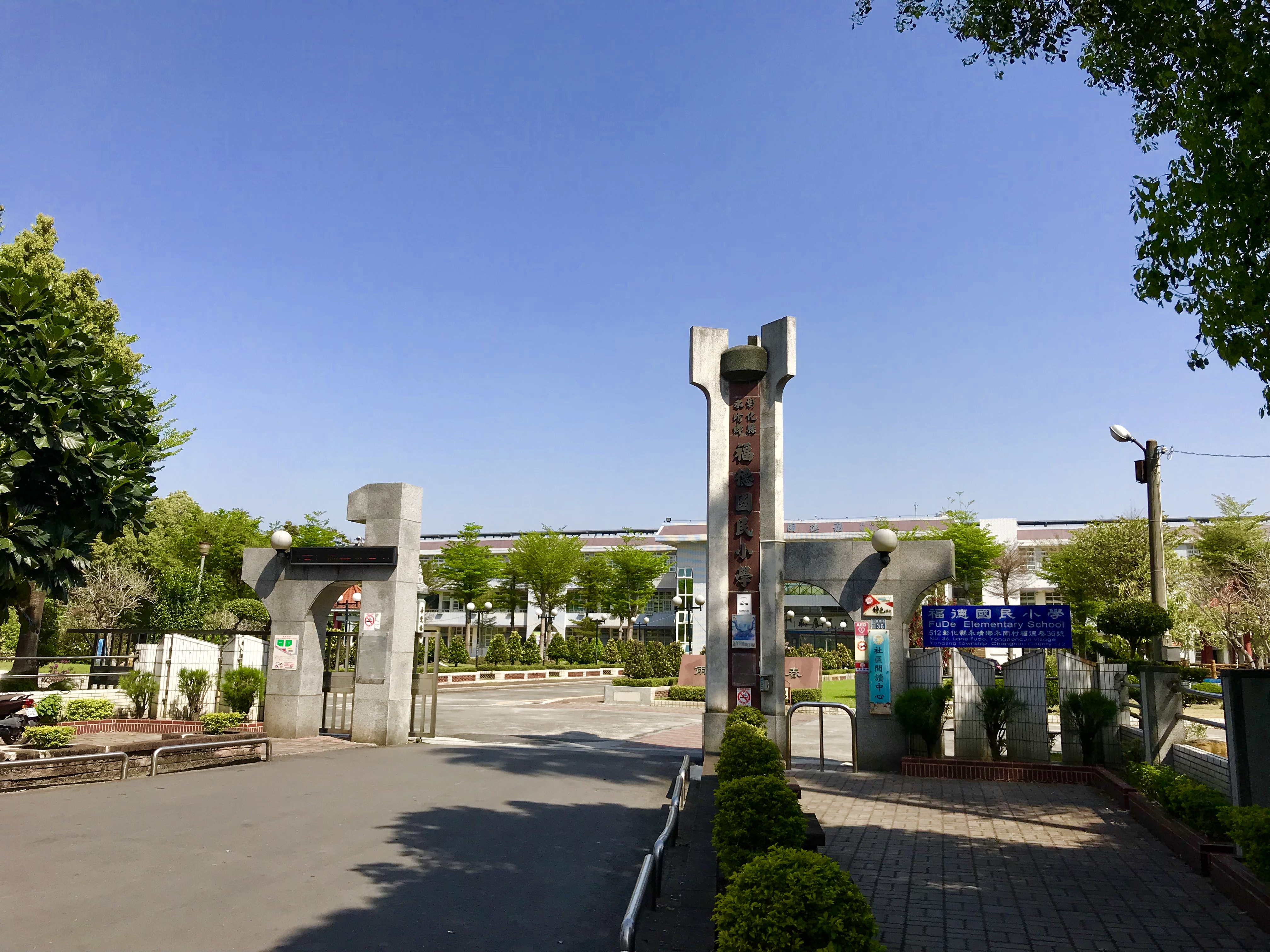 中文（台灣）: 彰化縣永靖鄉福德國民小學校門